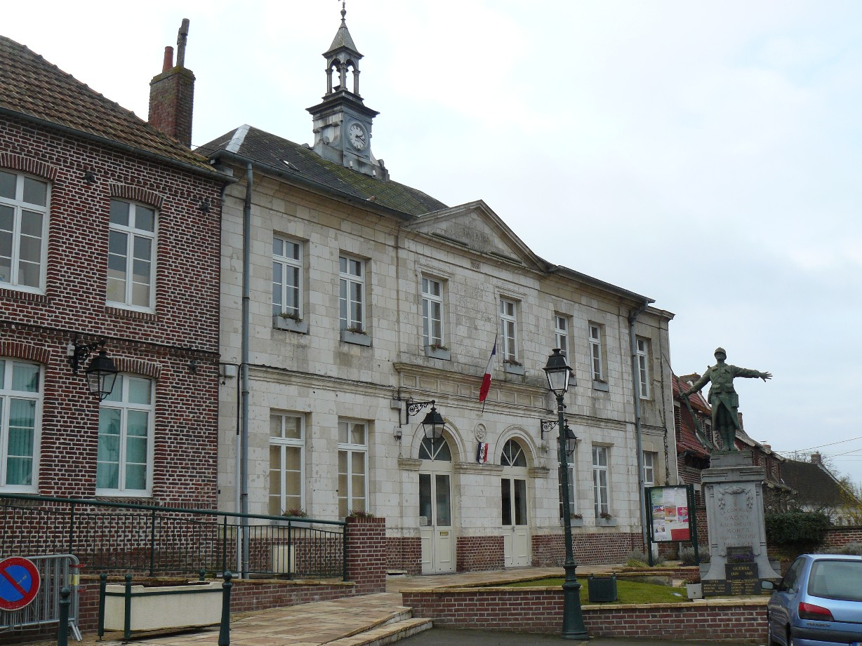 La mairie d'Agny et le monument aux morts